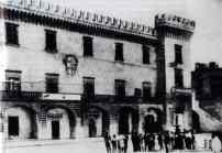 Palazzo Ducale Carosino 1900